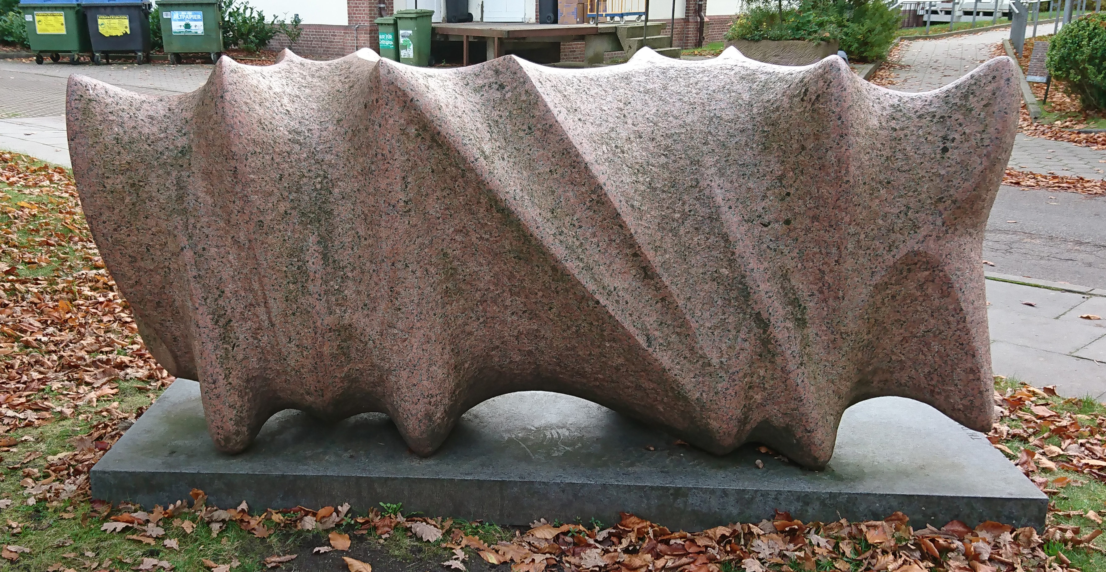 Rinder von Thomas Darboven, 1979